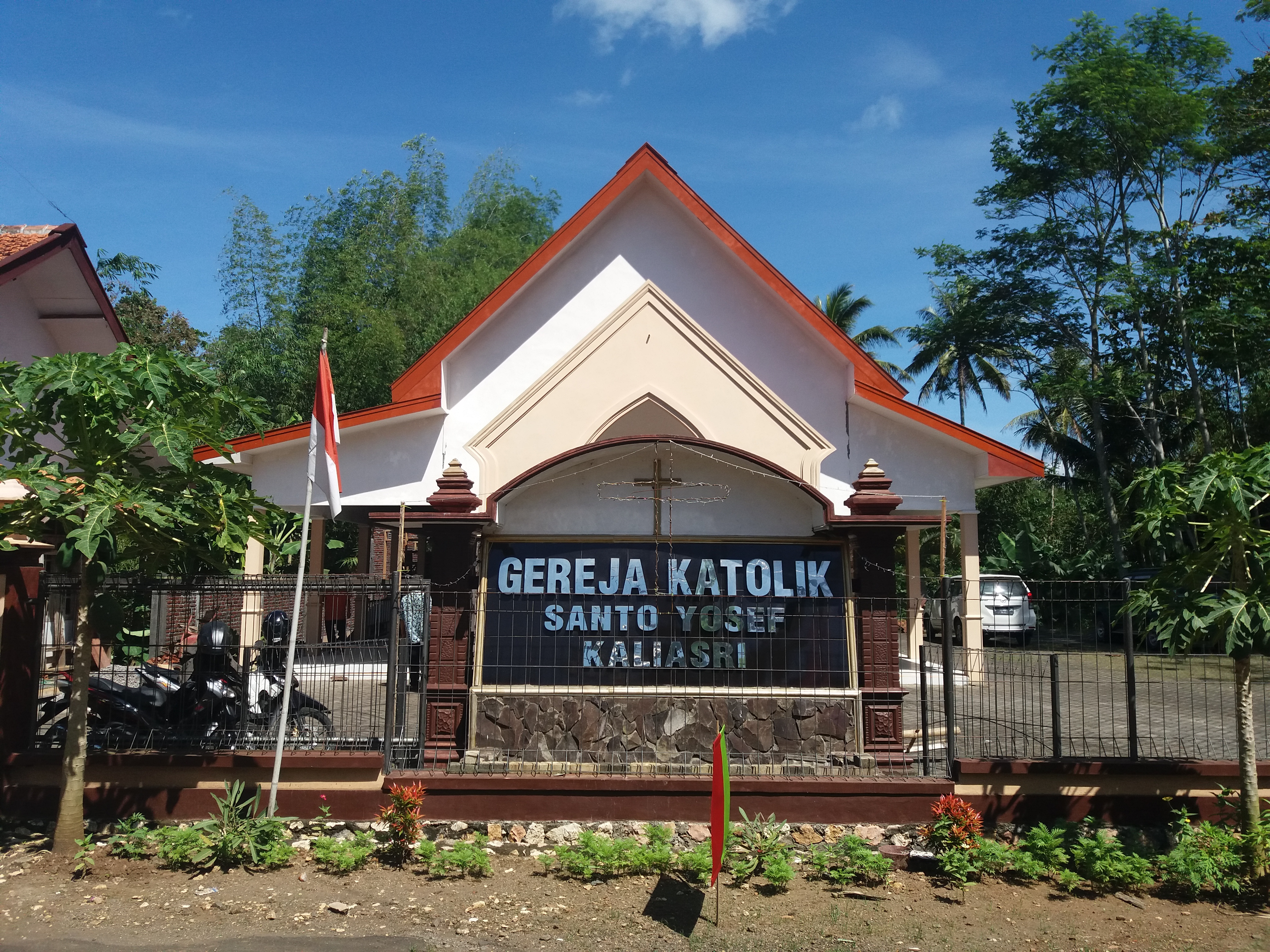 Gereja Katolik Santo Yosef Kaliasri Kalipare Gereja Katolik Stasi Santo Yosef Kaliasri, Kalipare. Kabupaten Malang